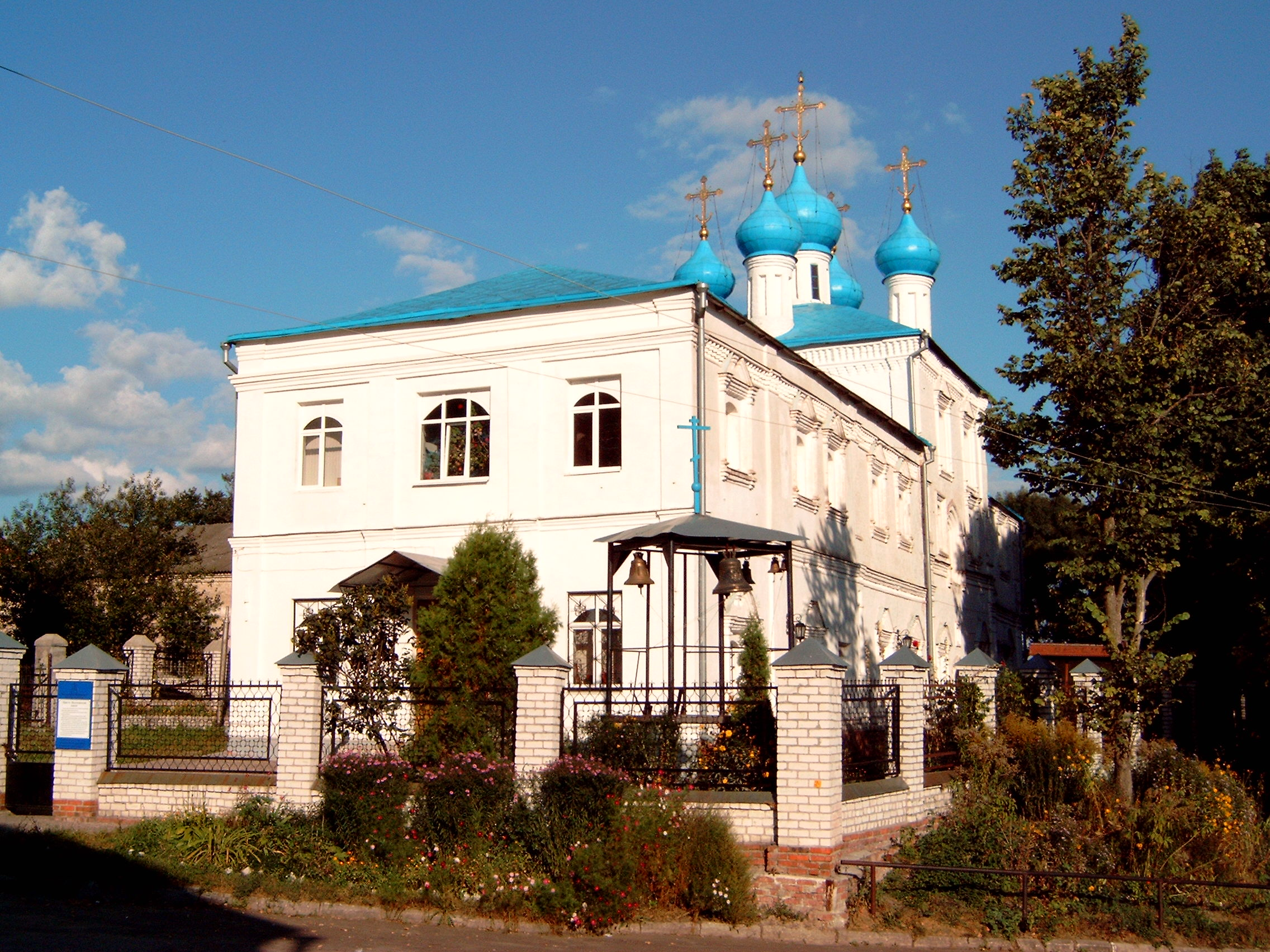 {Покровски събор в град Брянск